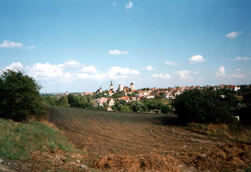 Blick auf Querfurt